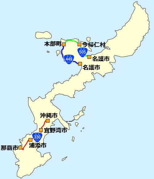 国道330号・国道449号・国道505号の位置図